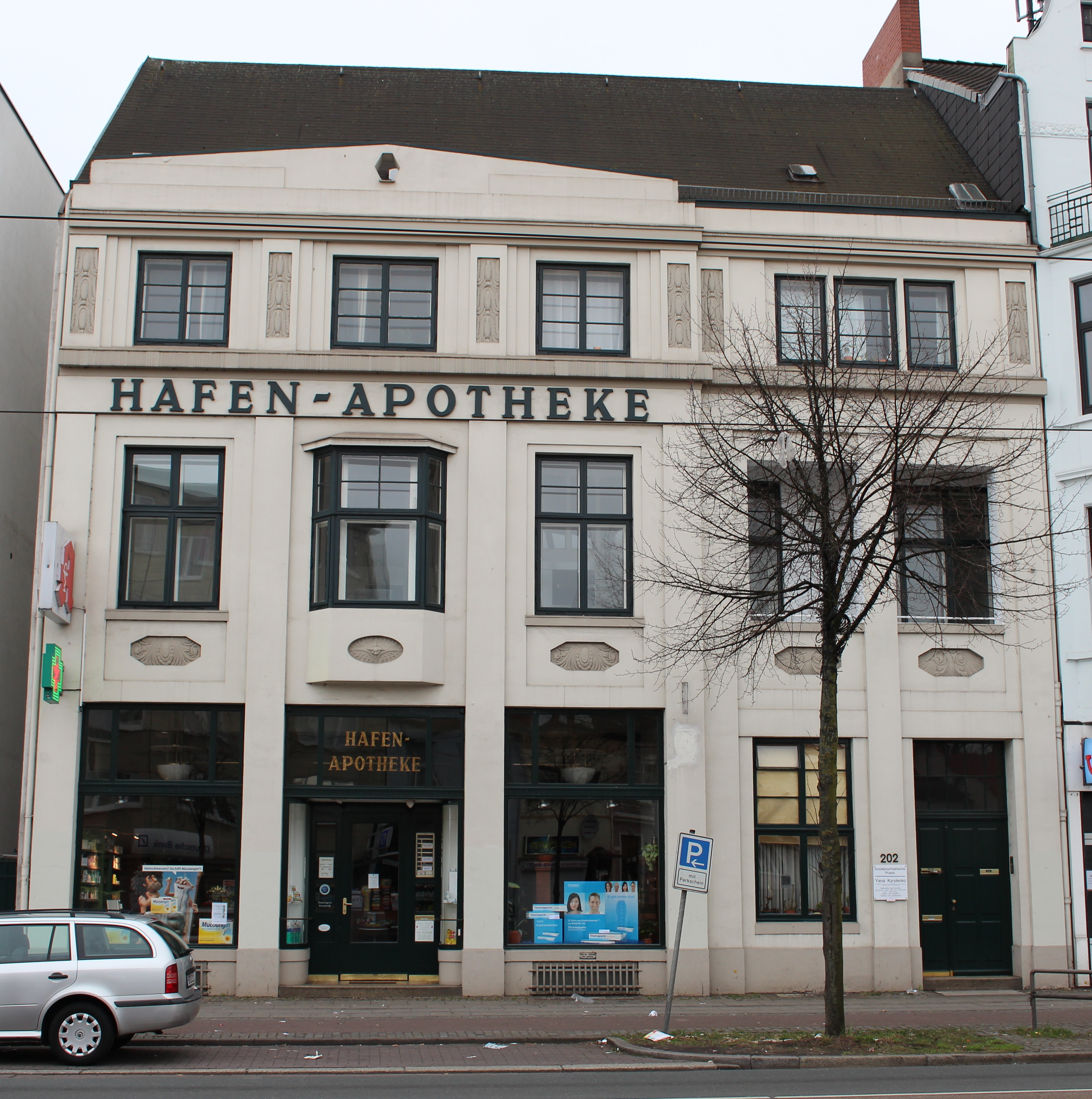 Hafenapotheke in Bremen, Gröpelinger Heerstraße 202. Das abgebildete Objekt ist ein geschütztes Kulturdenkmal in der Freien Hansestadt Bremen, mit der Nr. 0463 beim Landesamt für Denkmalpflege registriert.